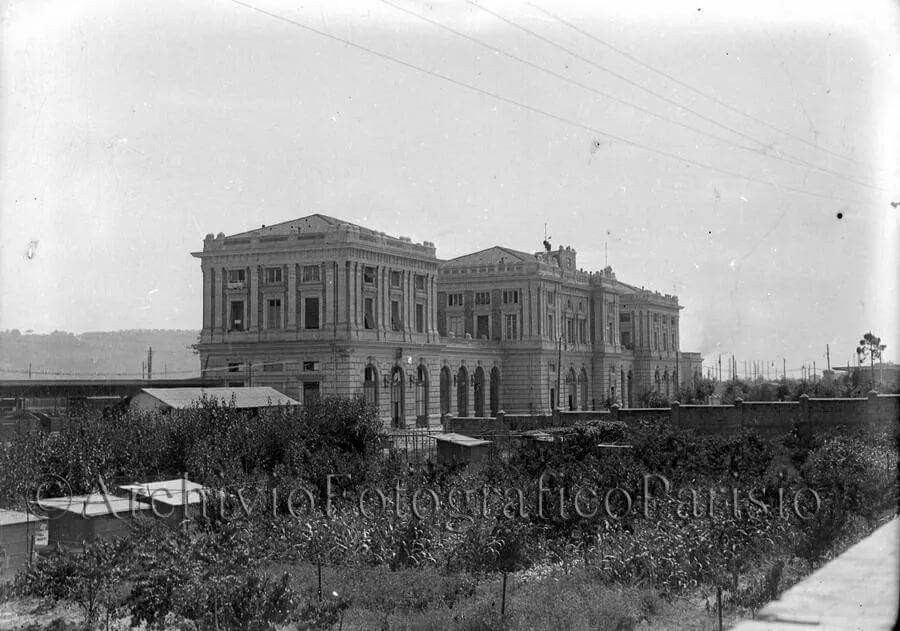 Napoli, Fuorigrotta - Stazione ferroviaria di Napoli Campi Flegrei. Autore sconosciuto.